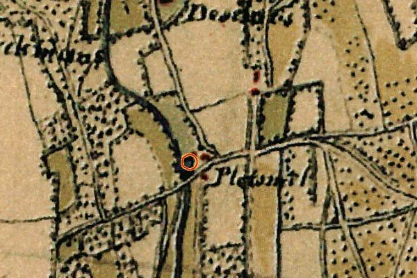 Kartenaufnahme der Rheinlande 1803-1820